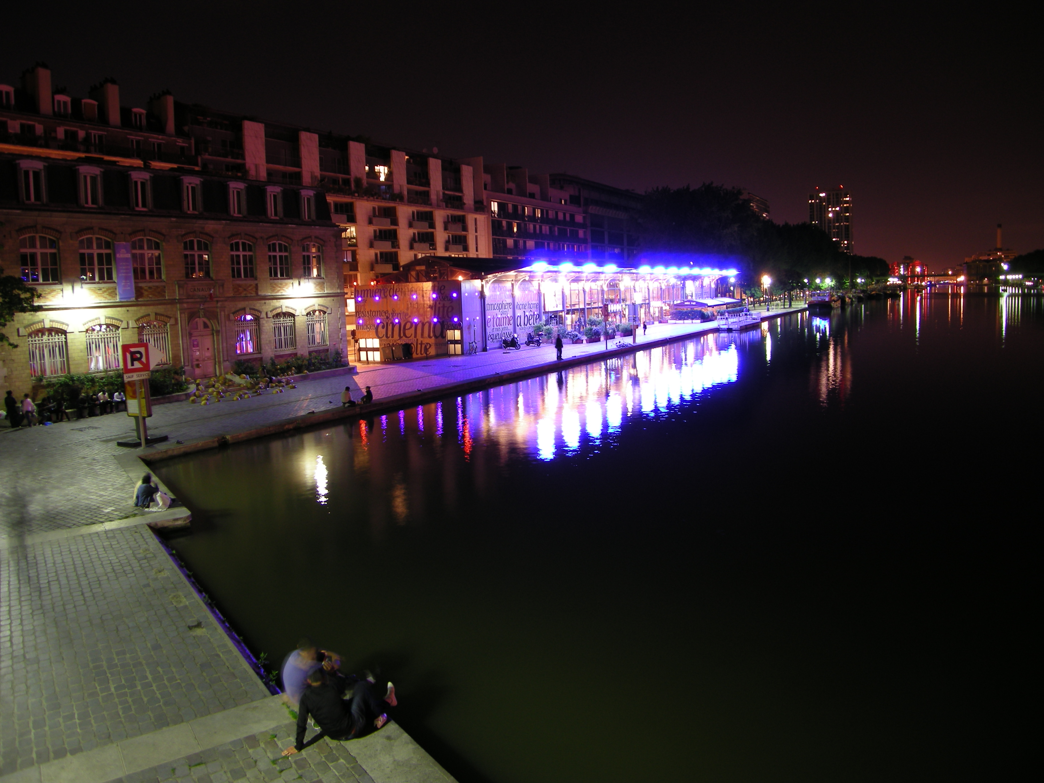 Quai de Seine, Bassin de la Villette, Paris XIXe, France